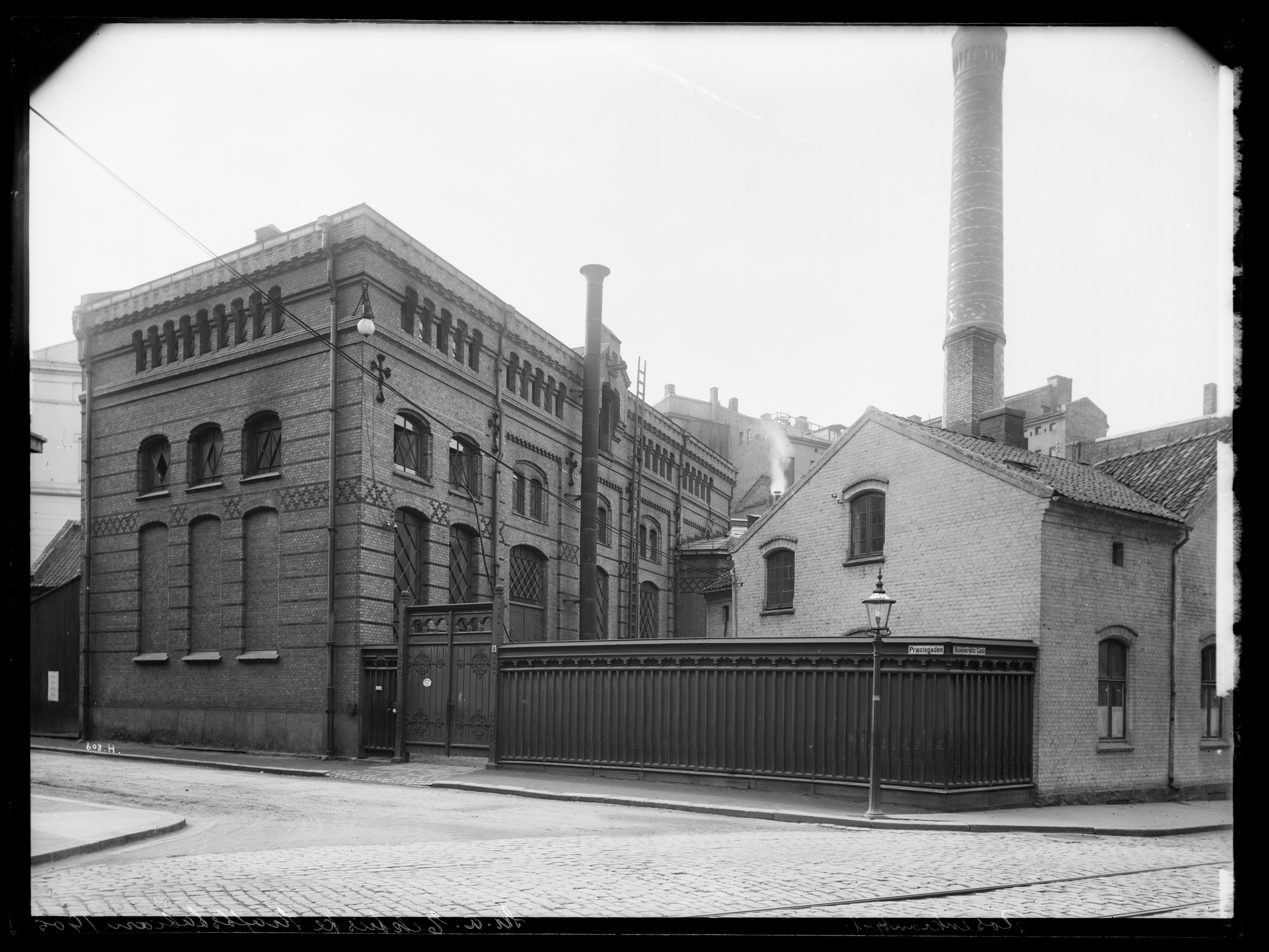 Bildet er hentet fra Nasjonalbibliotekets bildesamling. Anmerkninger til bildet var: Påskrift arkivark: Kr.a. Elektriske Kraftstation 1905 Eldste arkivnummer: 608 Yngre arkivnummer: 89, 33 Oslo, Oslo, Oslo